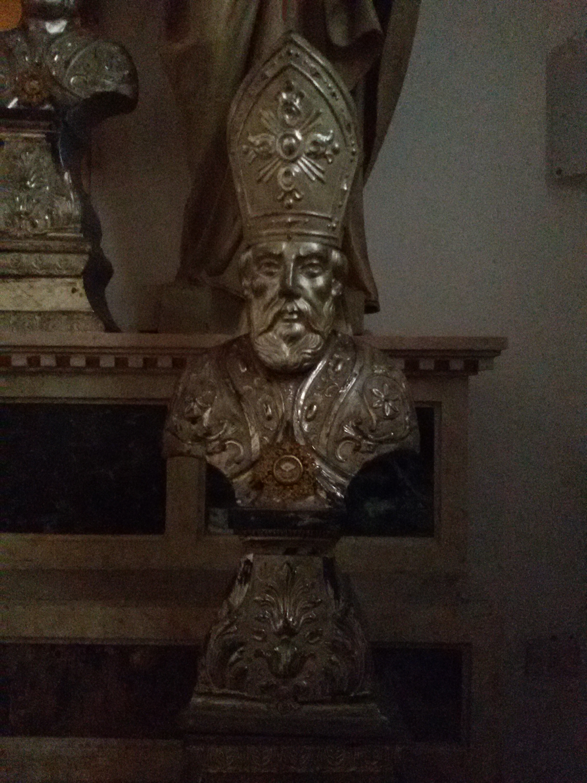 Chiesa di Santa Cristina Quinto di Treviso